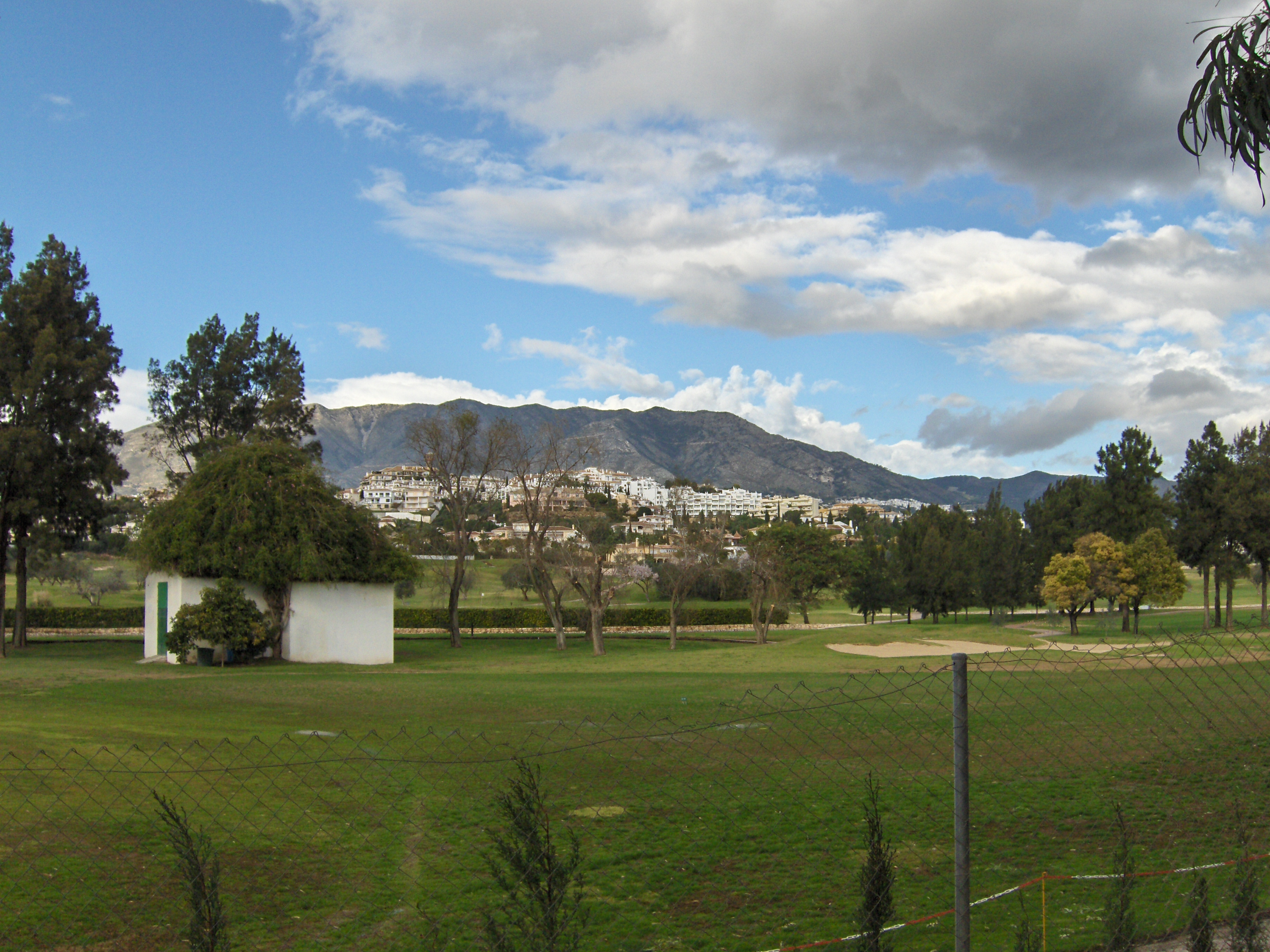 Mijas Golf, Málaga